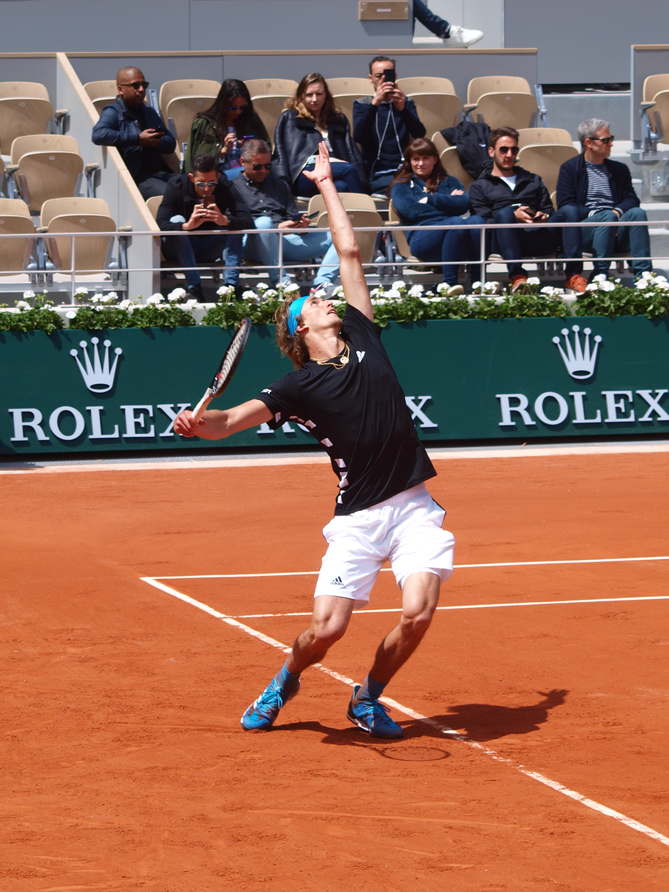 Alexander Zverev, sur le court Chatrier du stade Roland Garros, le 28 mai 2019